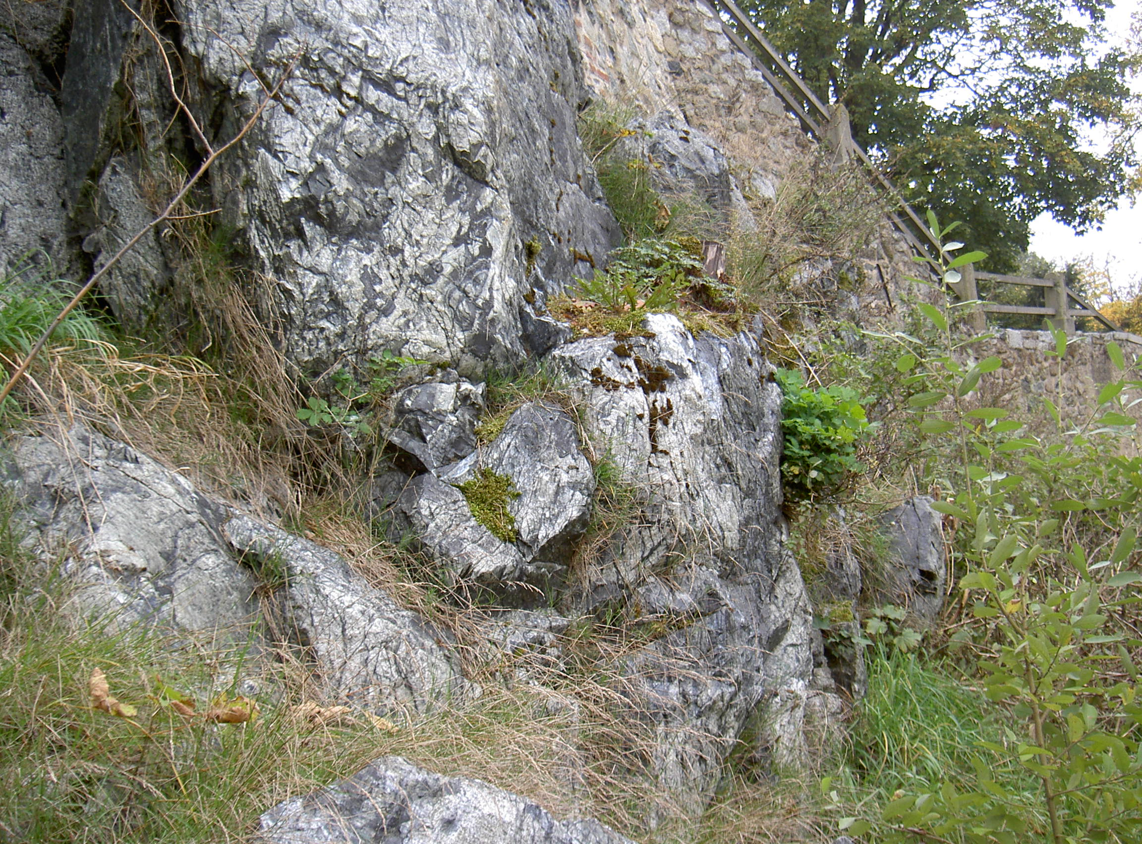 Serpentinitfelsen Schlossberg Waldau